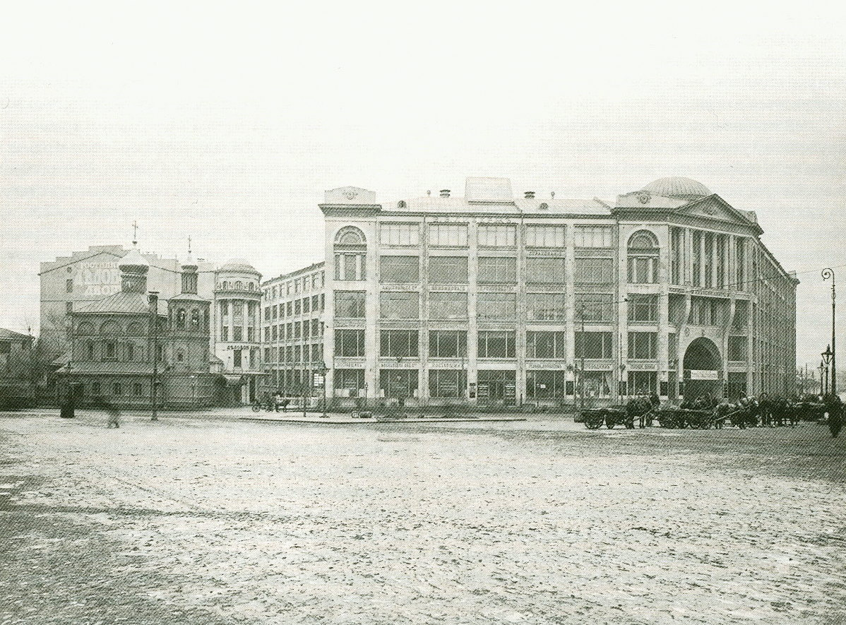 Здание "Делового двора" у церкви Всех Святых. Вид с северо-запада. Фот. 1913 года. РГИА.